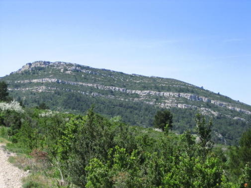 Montagne d'Alaric, du massif des Corbières, département de l'Aude (France)